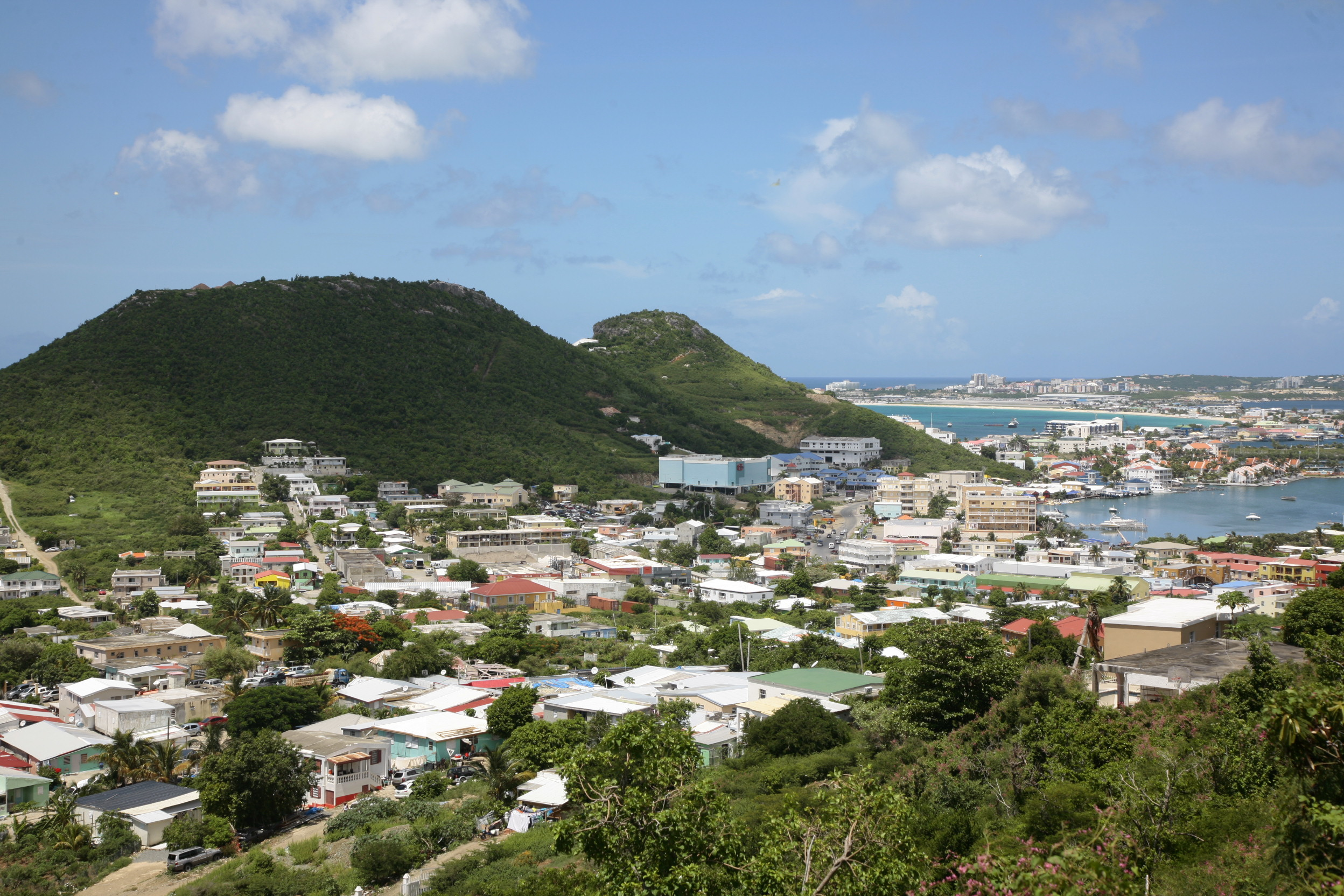 Vue sur Simpson Bay et Cole Bay